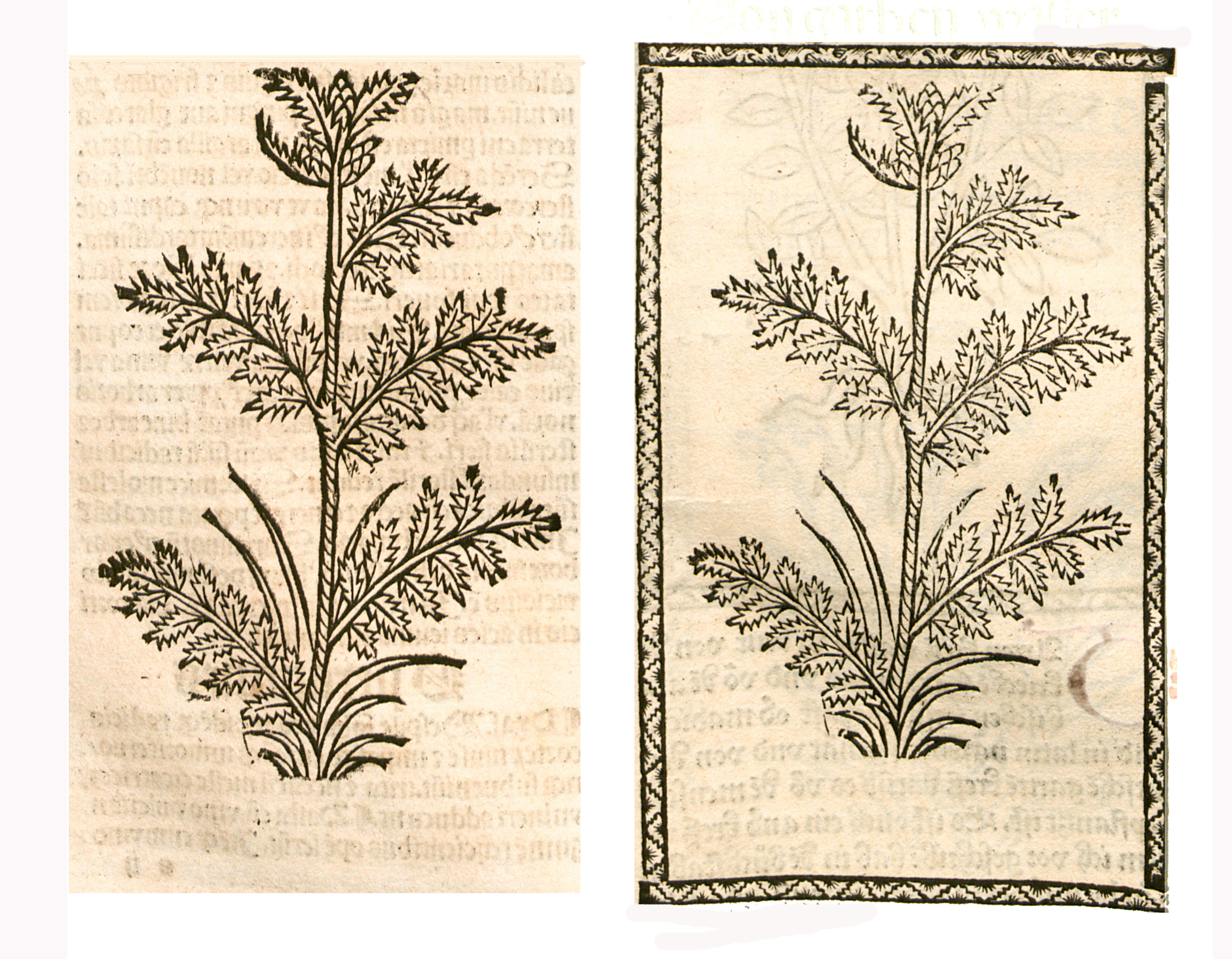 Abbildung zum Kapitel Garben (Achillea millefolium)